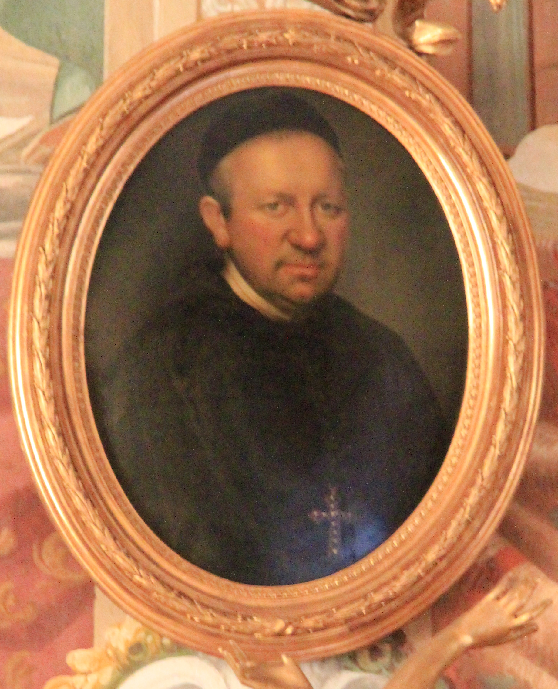 Marian Schirmer war von 1693 bis 1705 Abt des Stiftes Heiligenkreuz bei Wien. Das Bild hängt in der Heiligenkreuzer Stiftsbibliothek und wurde vor 1701 gefertigt.